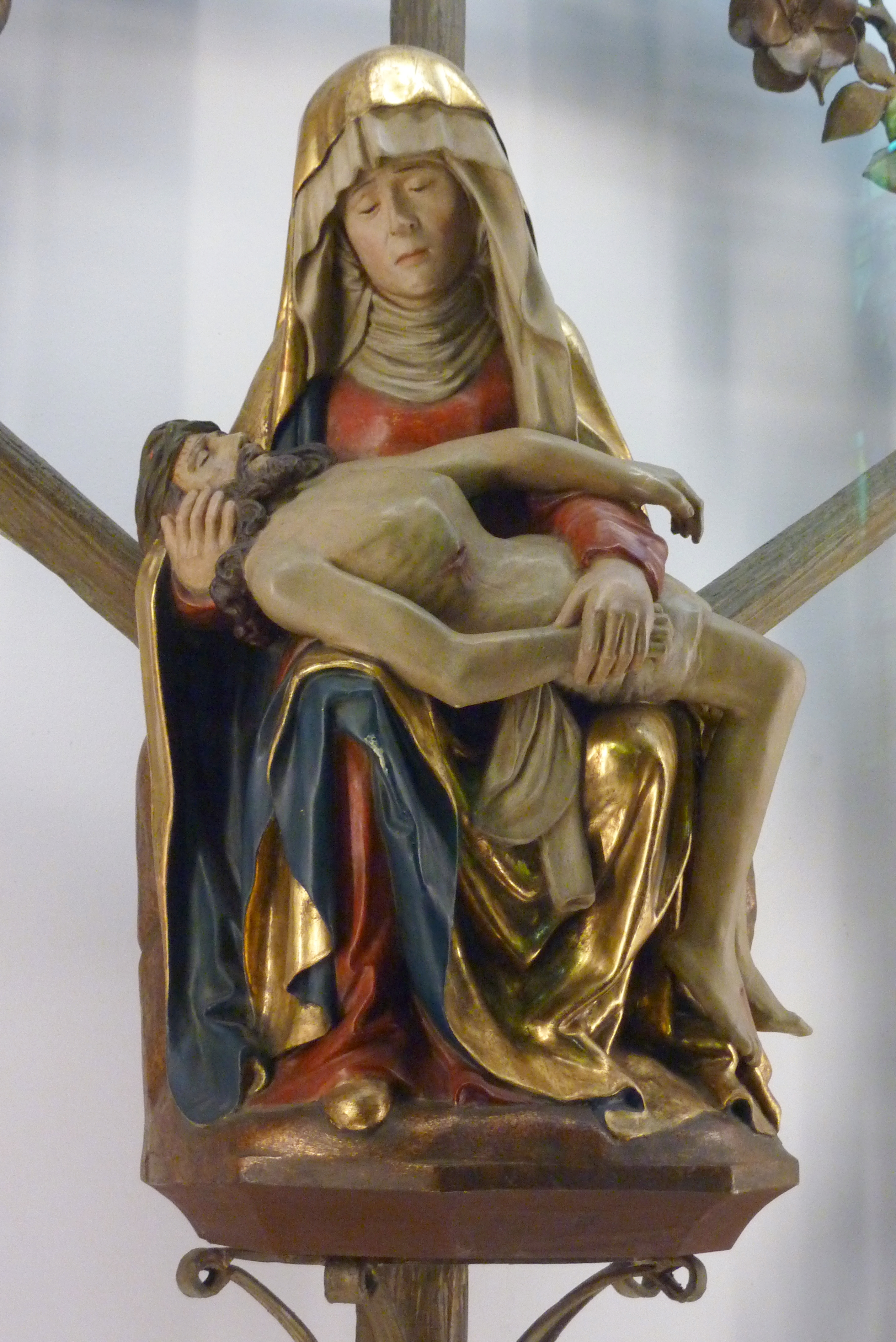 Wallfahrtskirche Maria Martental